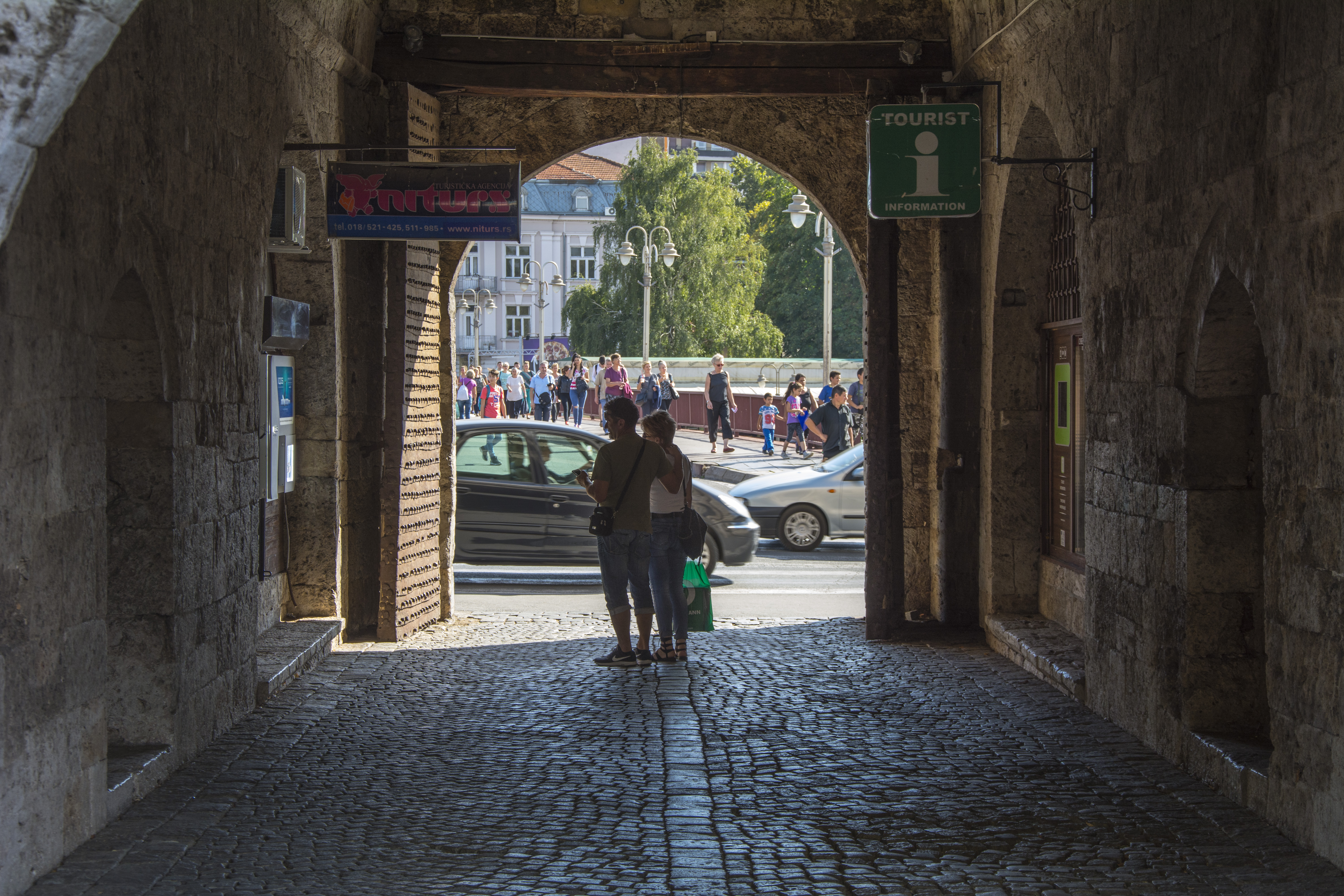 Град Ниш